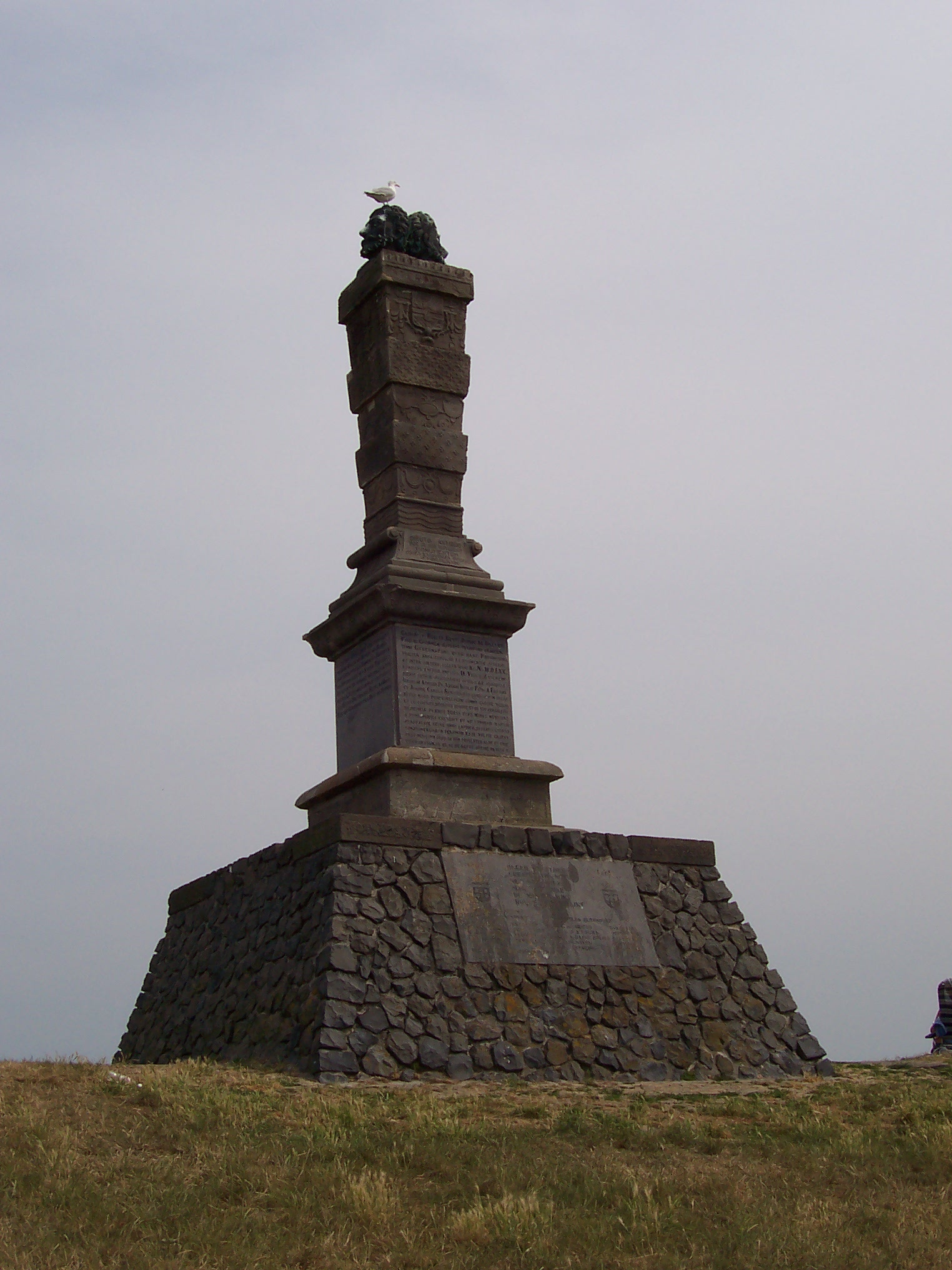 De Stenen Man te Harlingen. Monumentale grenspaal, origineel geplaatst 1576 tijdens bewind van van Caspar de Robles, stadhouder van Friesland; replica ± 1776